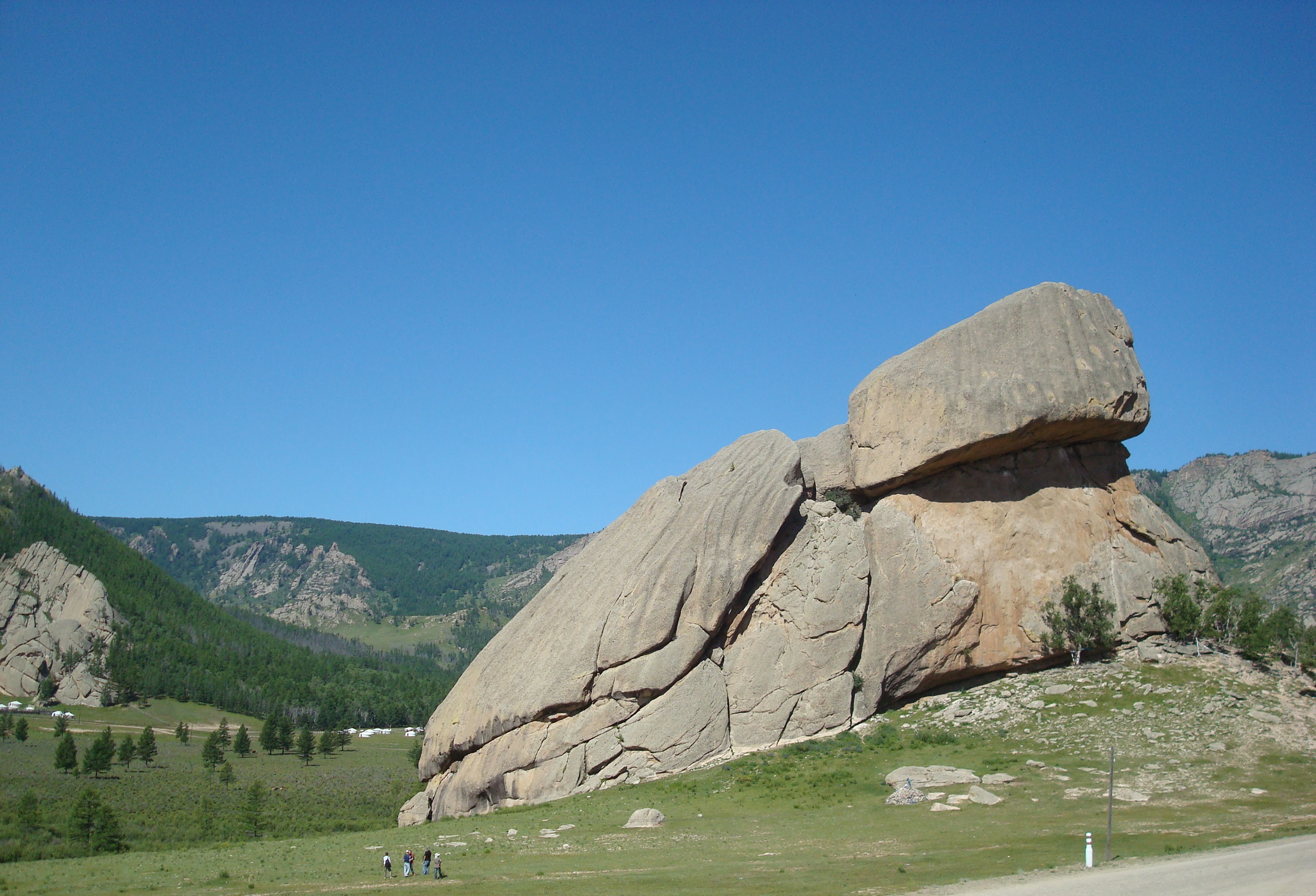 Gorchi-Tereldsch-Nationalpark